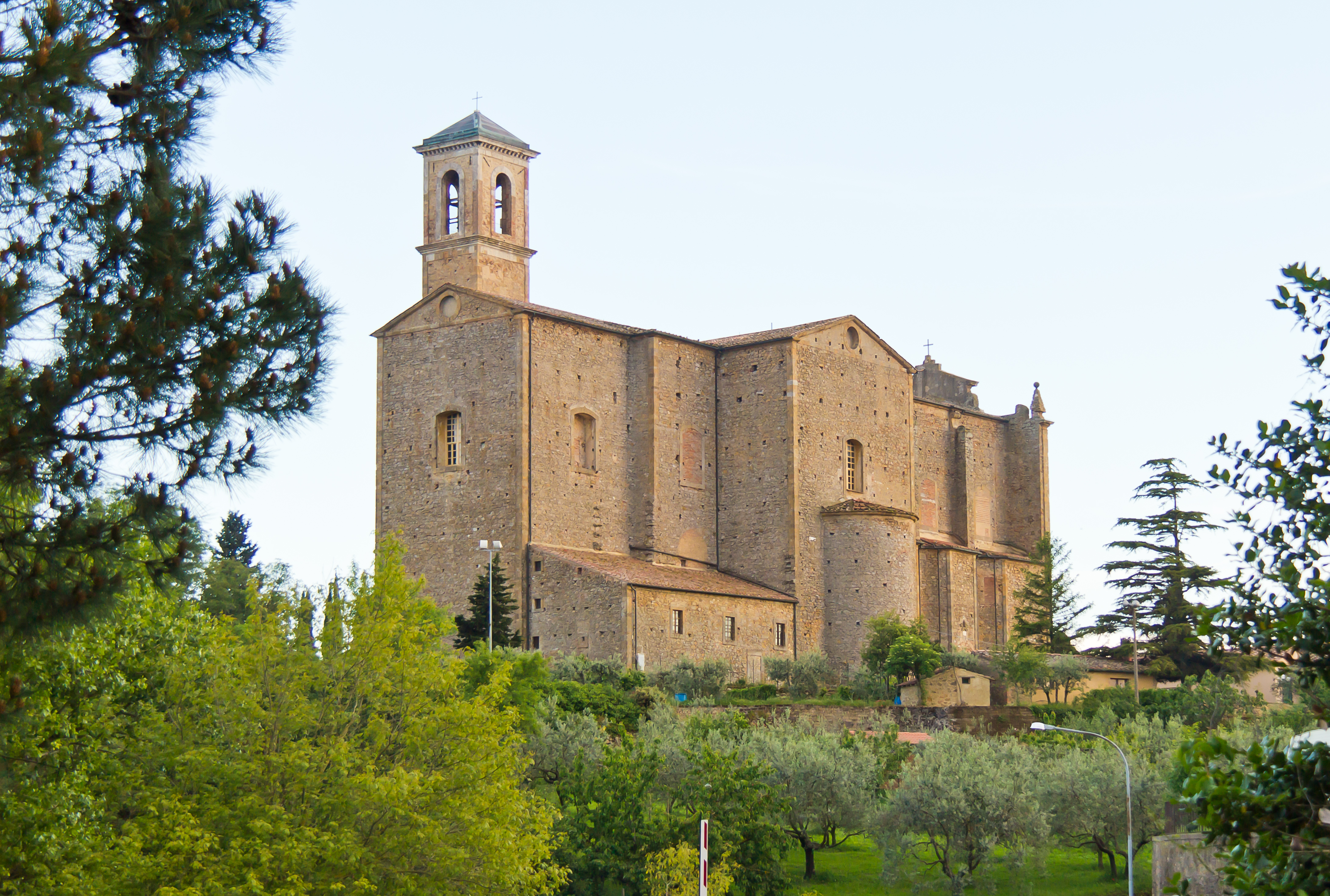 Santi Giusti e Clemente (Volterra)